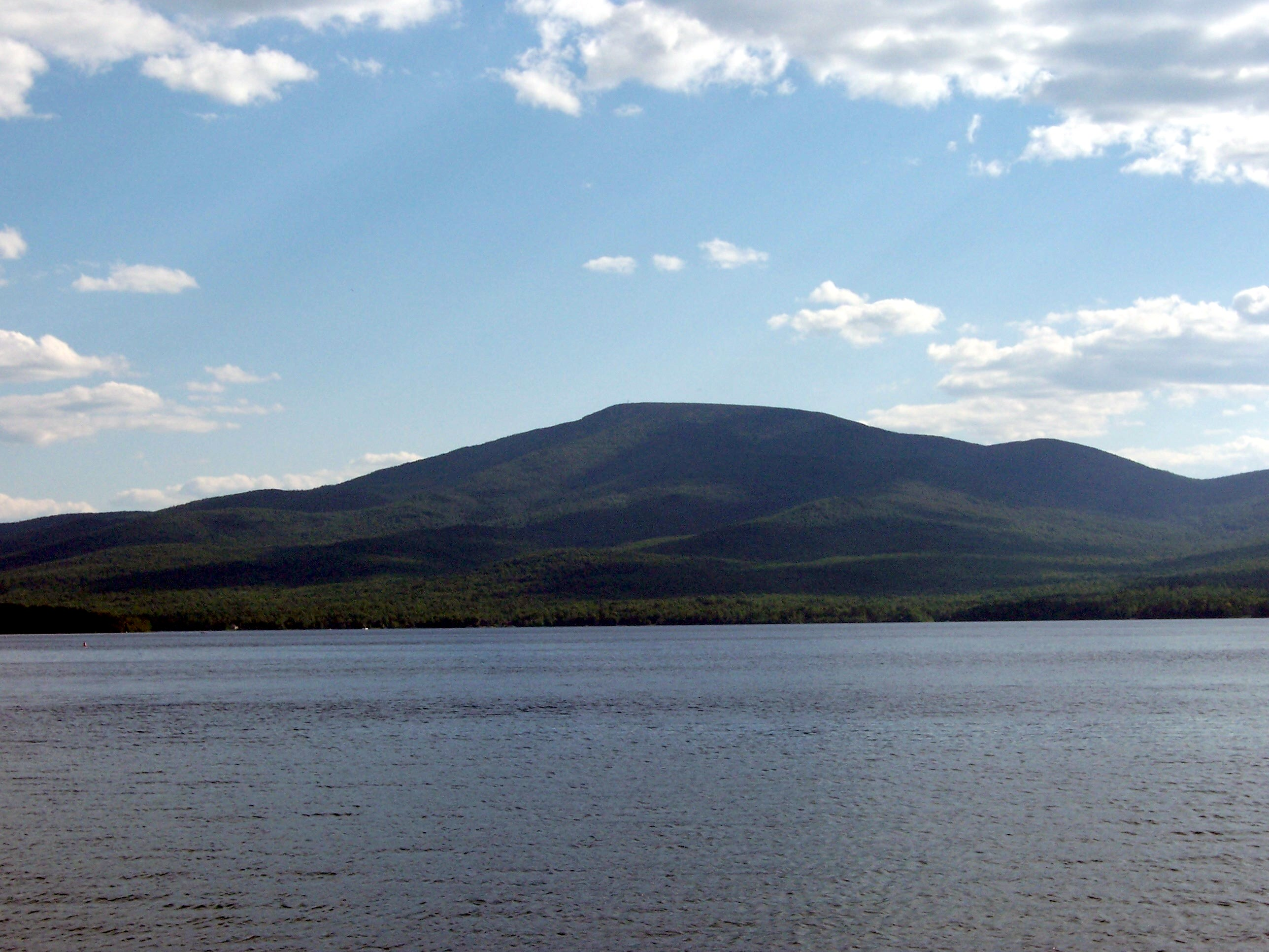 Vue du Mont Lyon à partir du lac Chazy